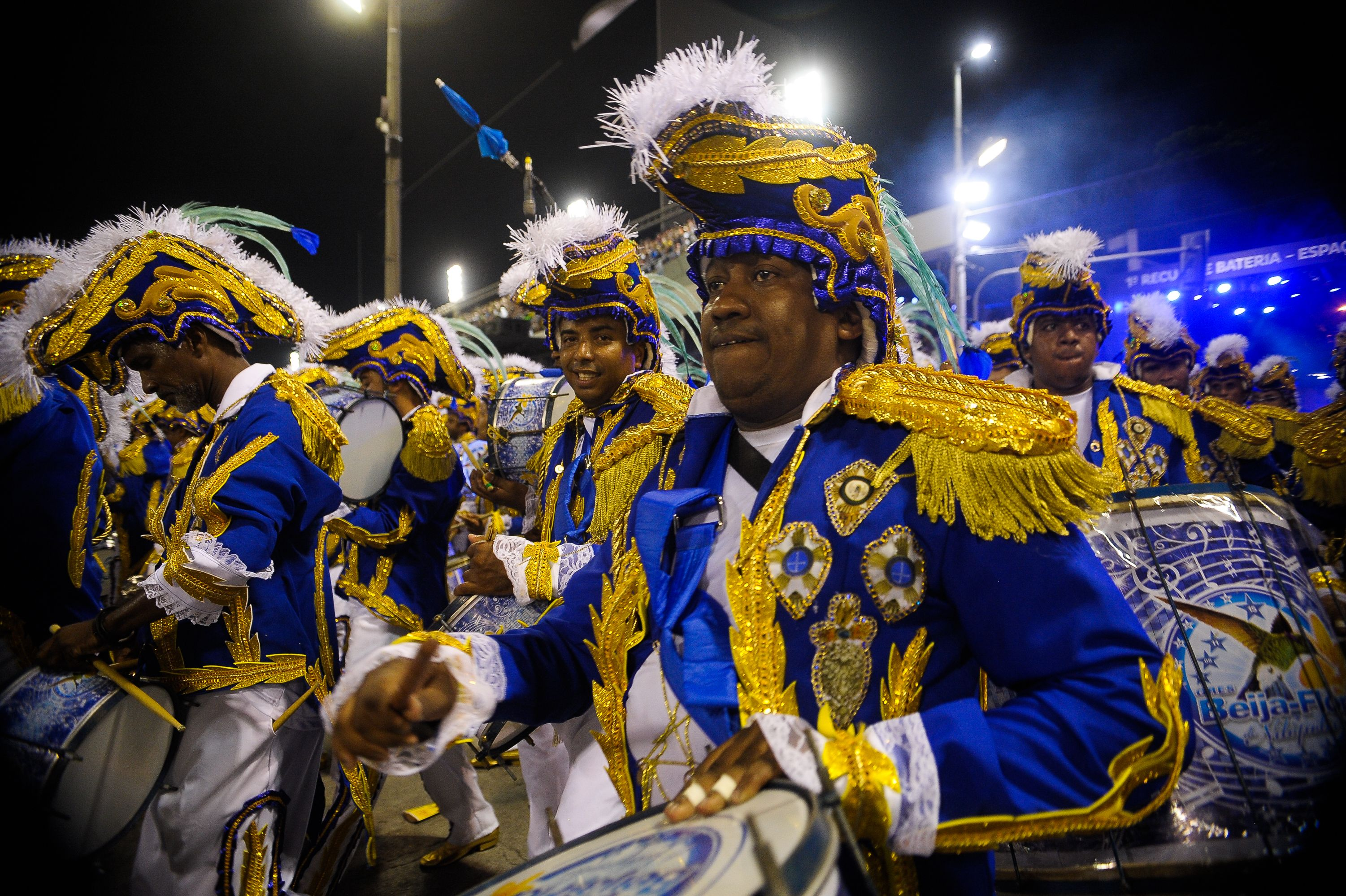 Rio de Janeiro - Beija-Flor de Nilópolis, terceira escola do grupo especial do Carnaval do Rio (Tomaz Silva/Agência Brasil)